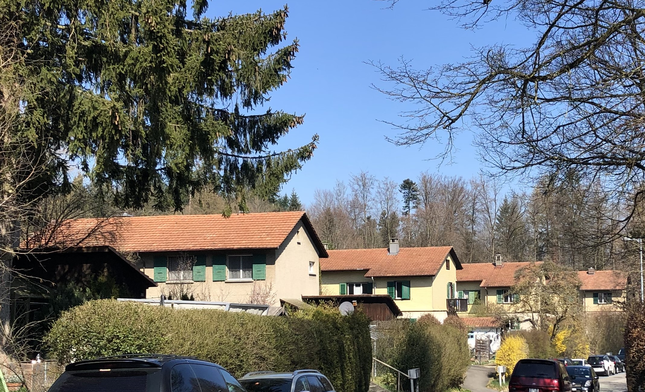 Winterhale Bebaung Siedlung